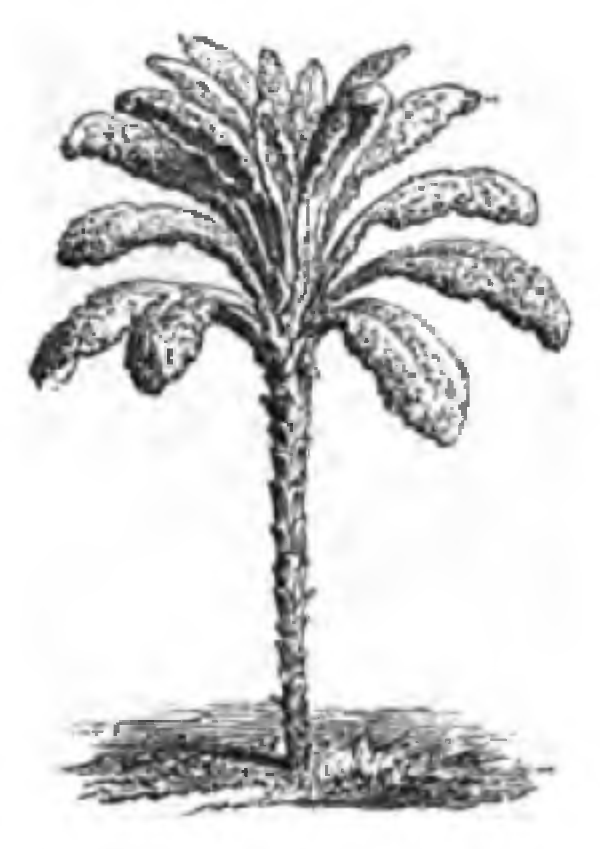 Les plantes potagères. Description et culture des principaux légumes des climats tempérés, 1re édition, ouvrage publié par la maison Vilmorin-Andrieux & Cie à Paris en 1883.